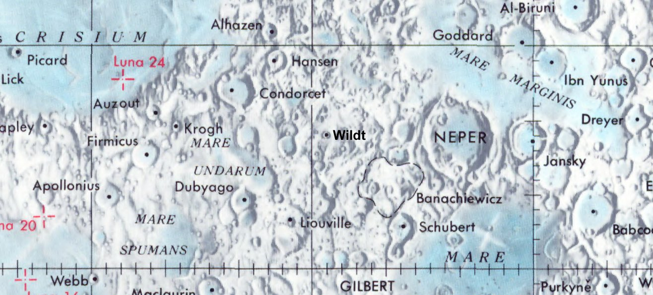 Cráter lunar Wildt. Localización. (Lunar Chart LPC1. Second Edition)